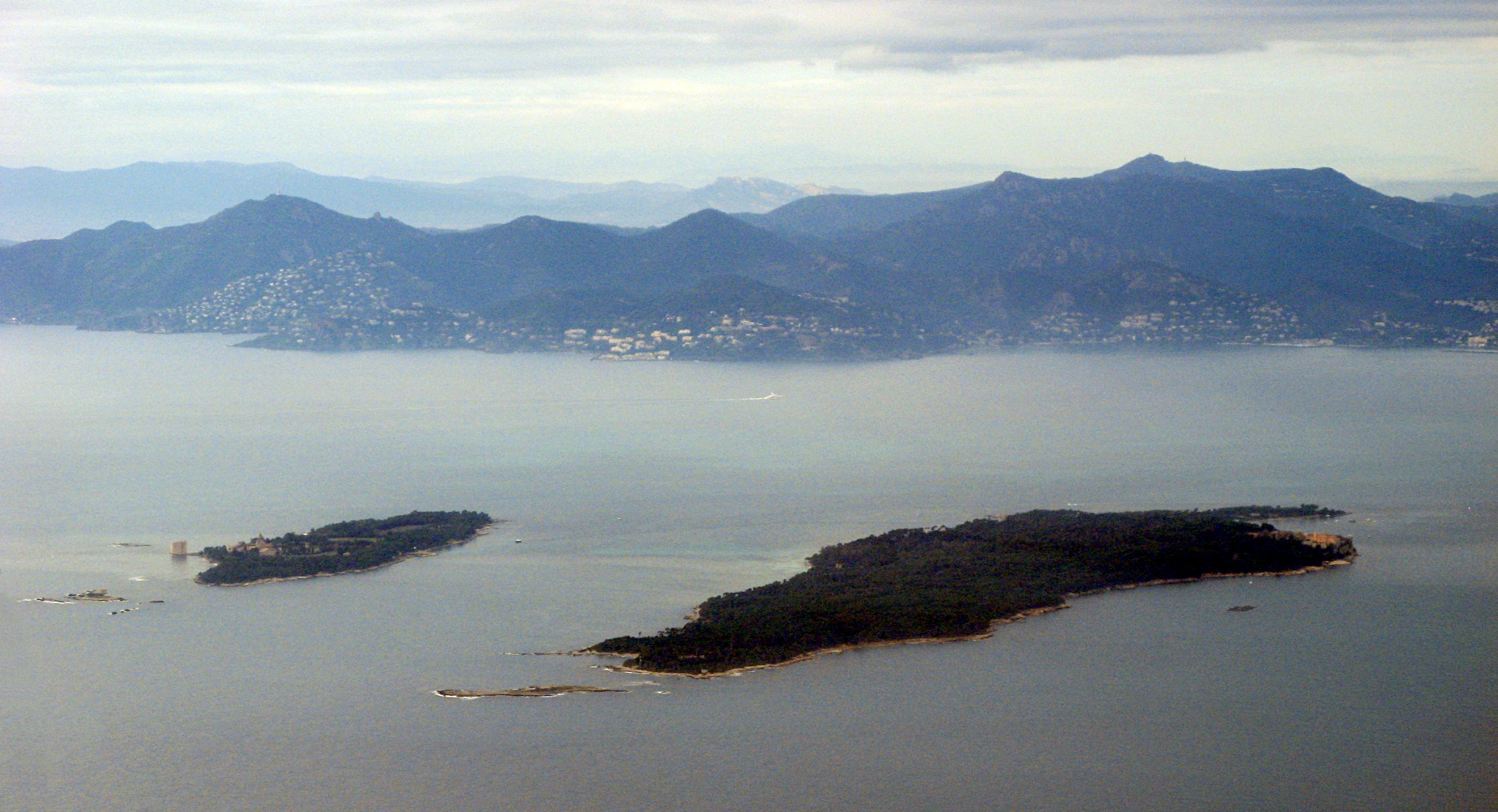 Леринские острова и массив Эстерель